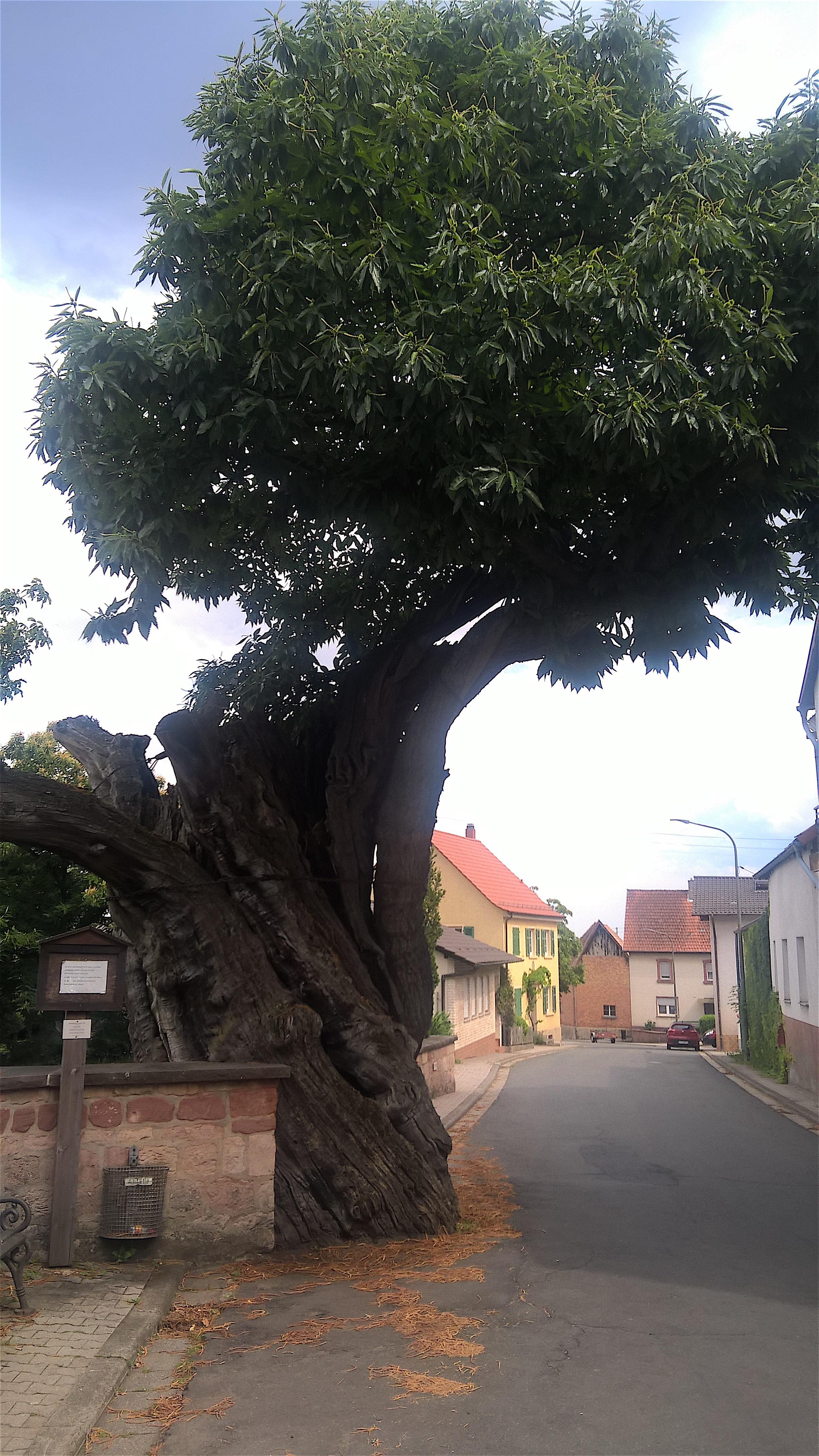 Edelkastanie in Dannenfels, 650 Jahre alt